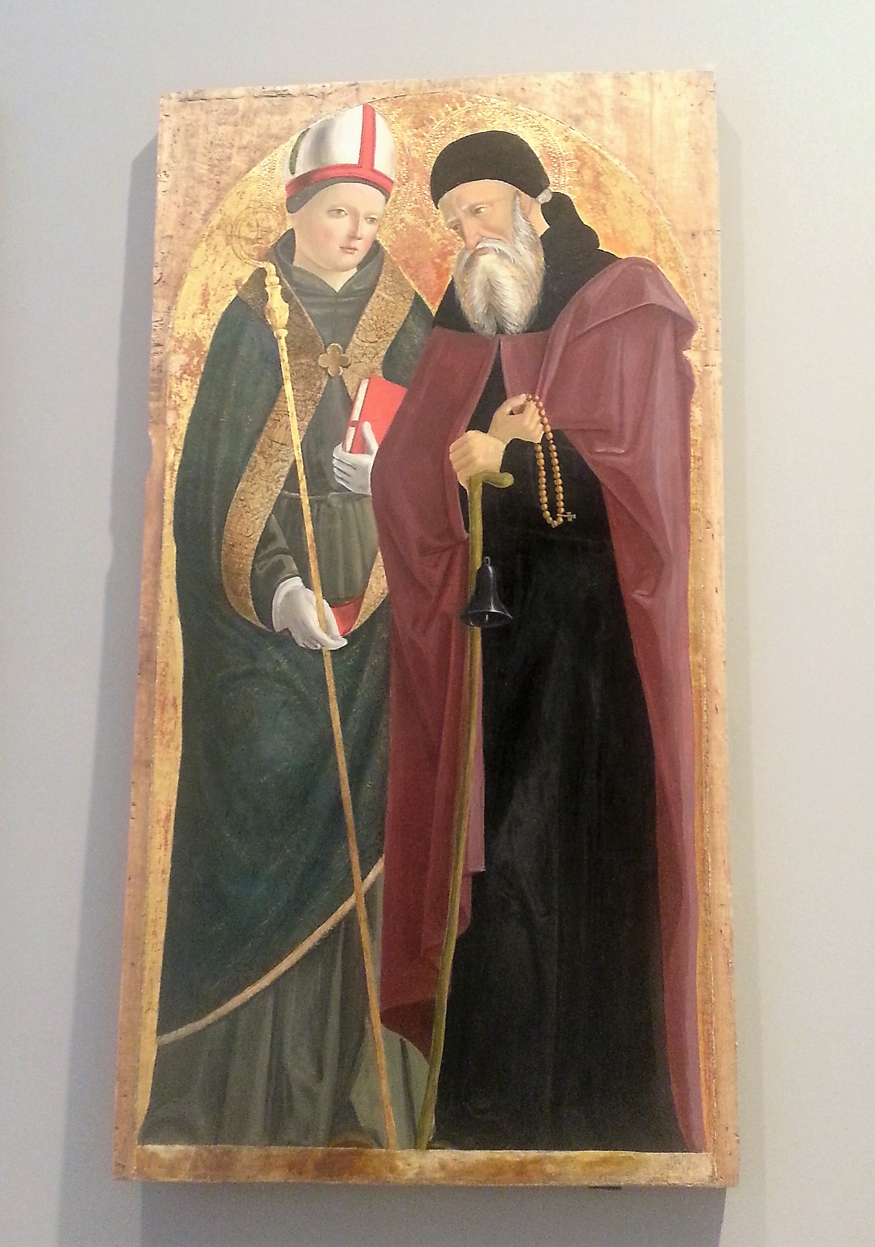 Polittico santi Ludovico da Tolosa e sant'Antonio Abate